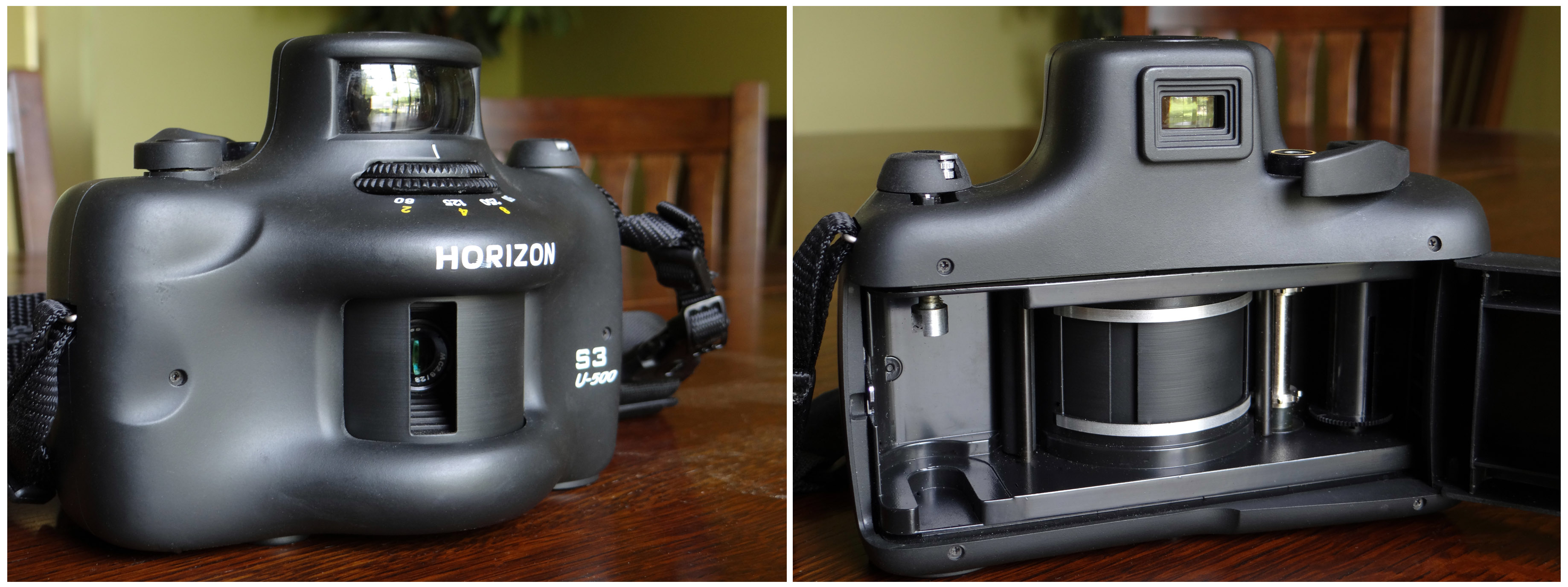 35mm